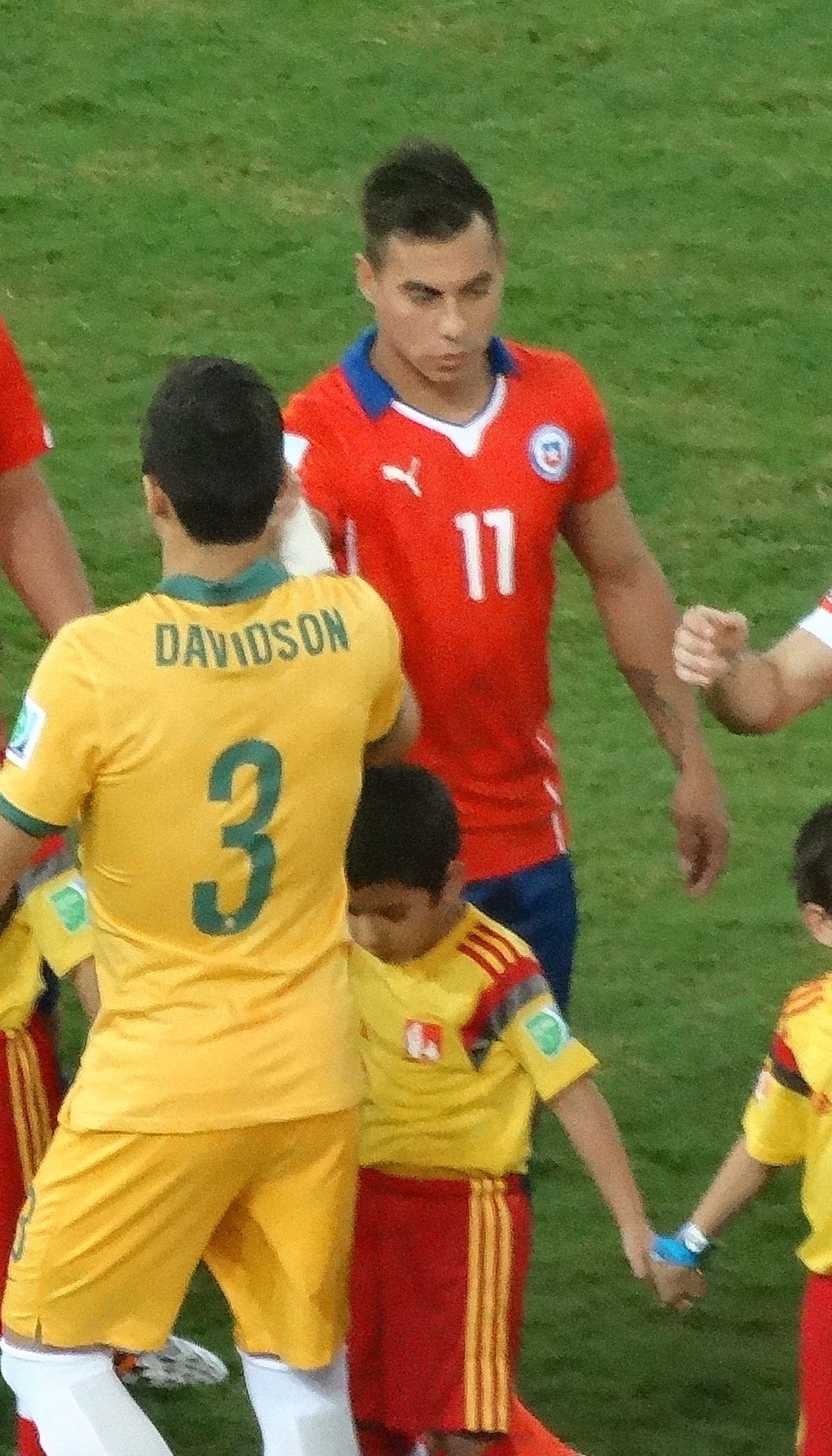 Eduardo Vargas antes del encuentro entre Chile vs. Australia